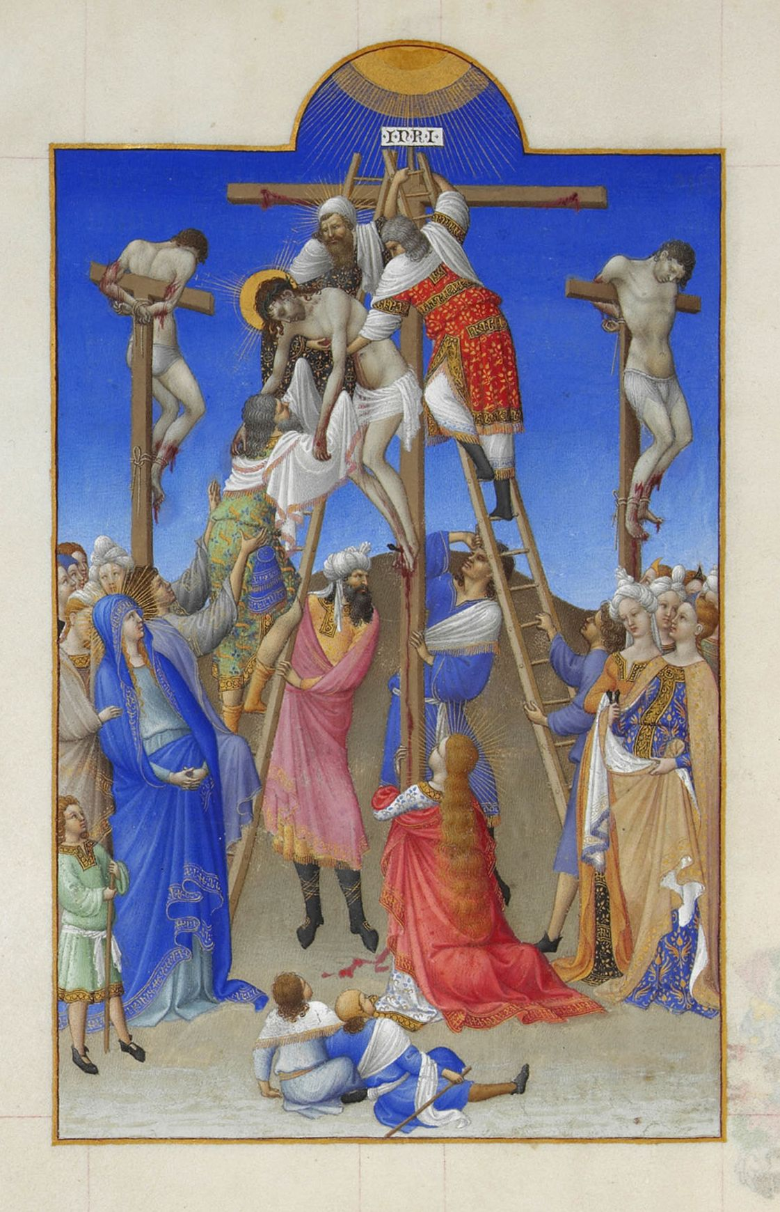 Le Christ, entouré des larrons, est descendu de la croix, la Vierge et saint Jean à ses pieds